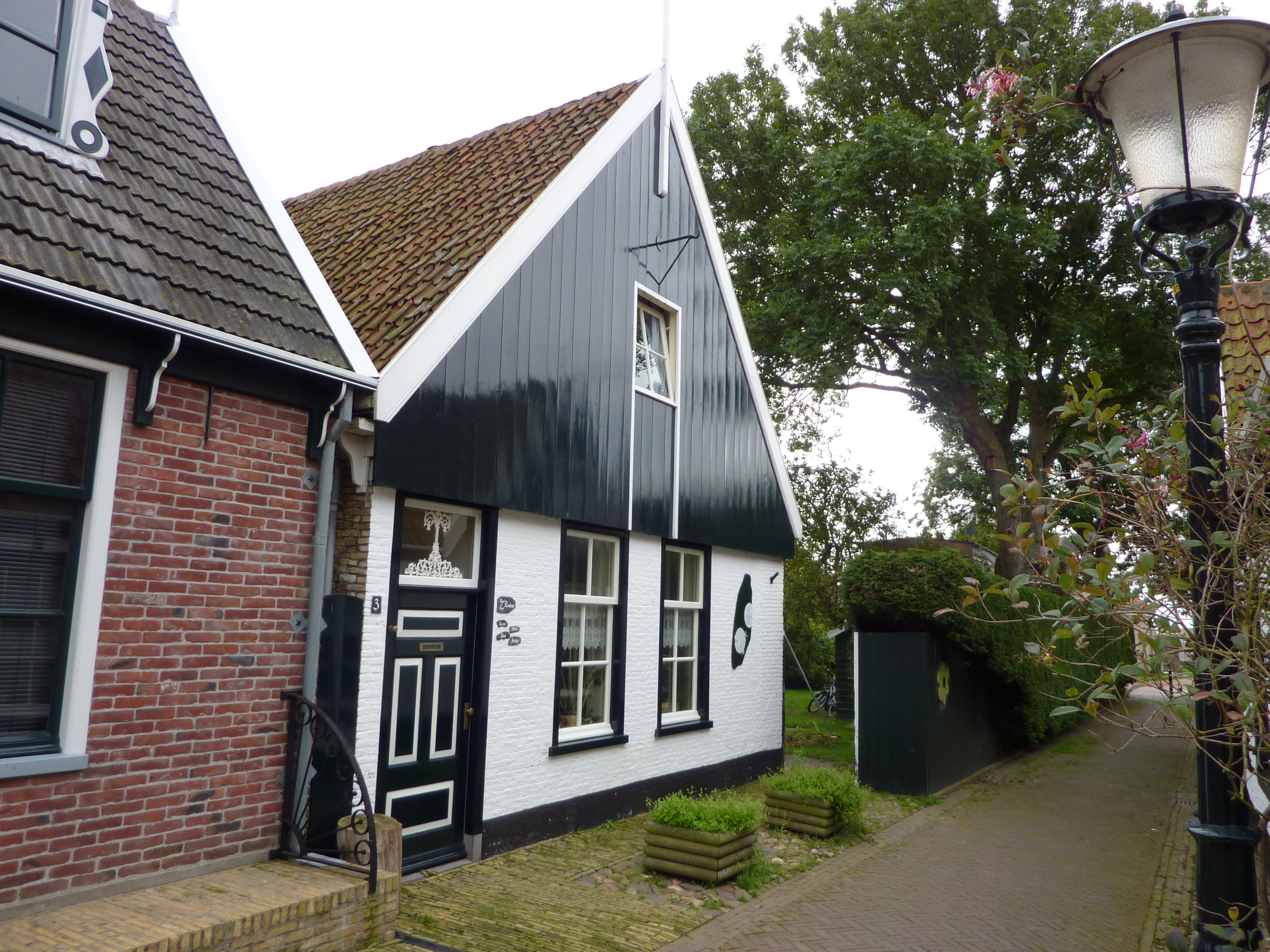 Woonhuis - Wierstraat 3, Oosterend, Texel